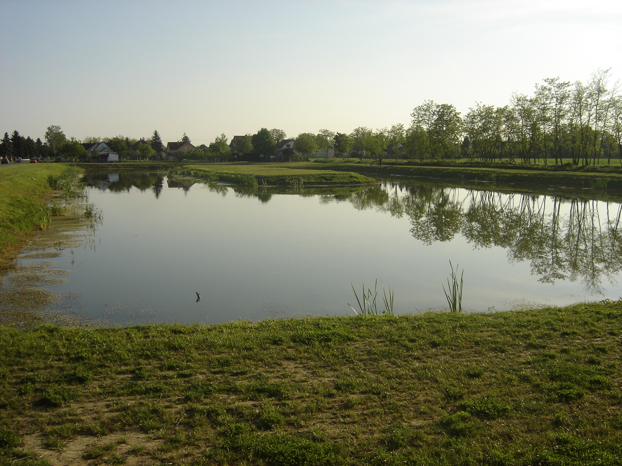 Jezero (Petlovac), Petlovac (Baranja)